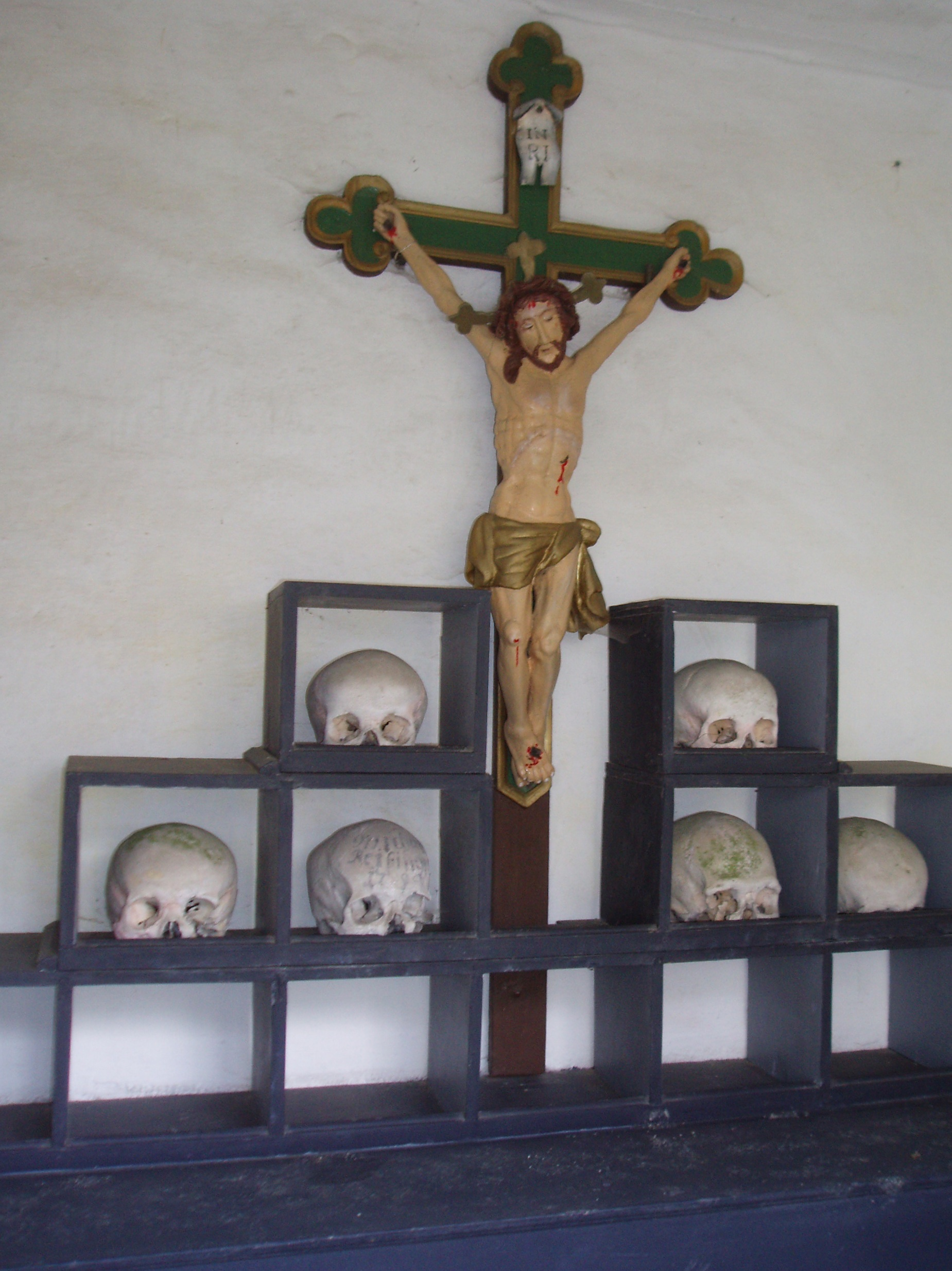 Rieshofen_im_Altmühltal,_Karnernische_an_der_Kirche_St._Erhard